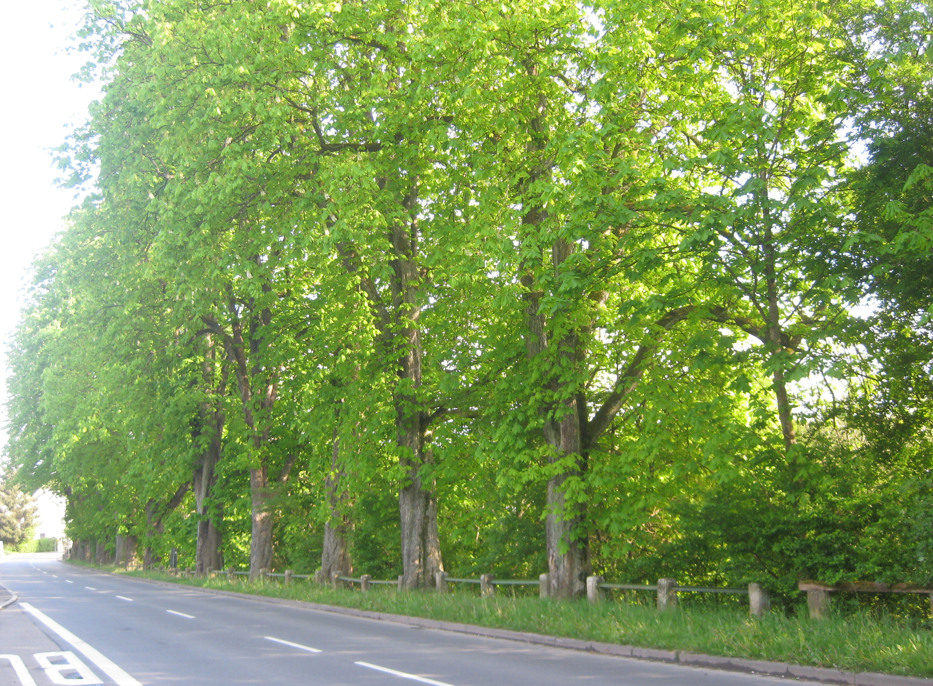 Als Naturdenkmal ausgewiesene Kastanien in der baden-württembergischen Gemeinde Eschelbronn